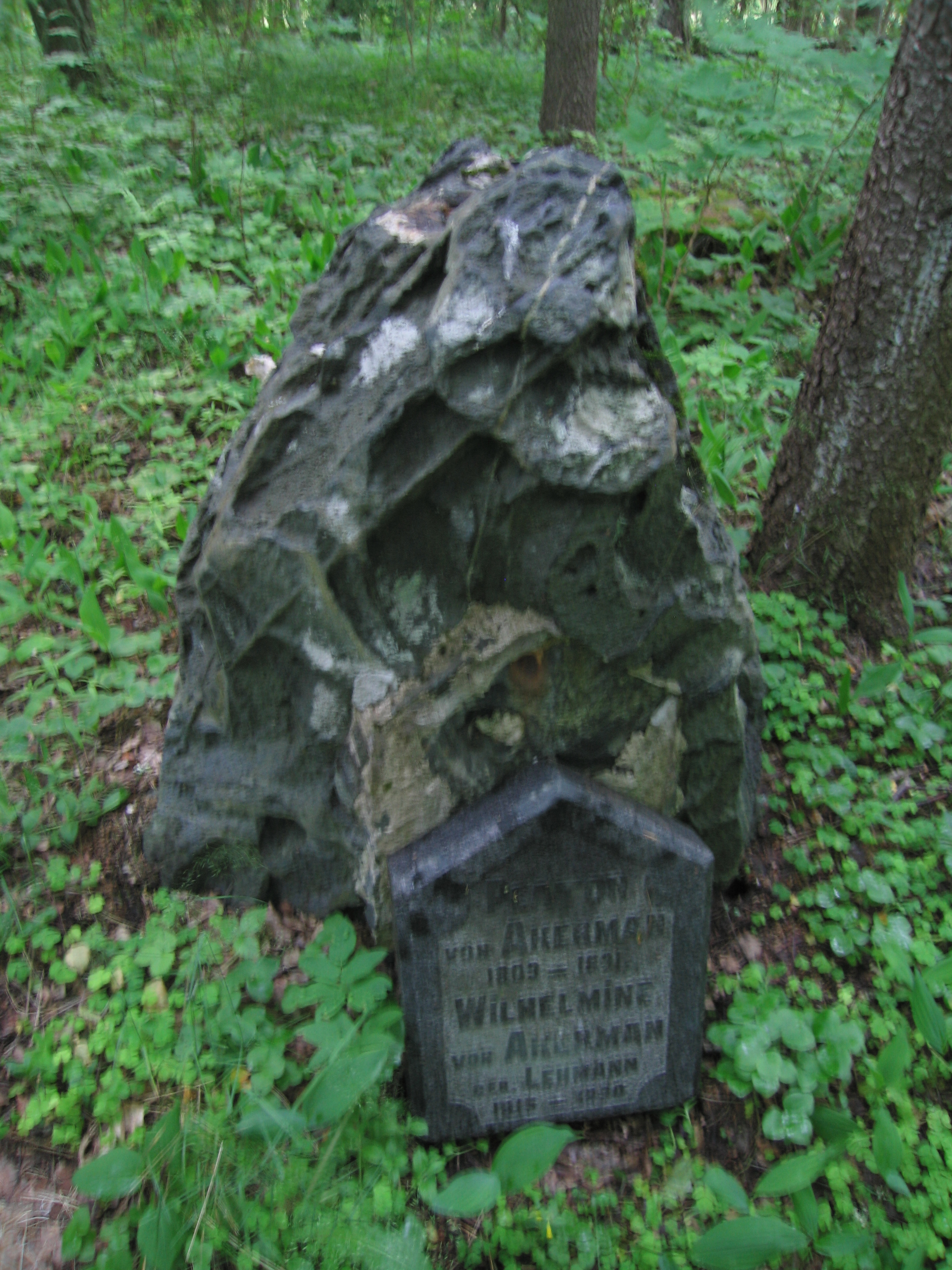 Akermanide hauatähis